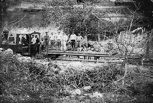 Artikutzako etxaldearen barnean obiliko zen lokomotora langilekin (Pedro Amuchastegi funtsa)